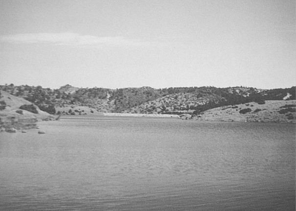 Candiraz Deresi